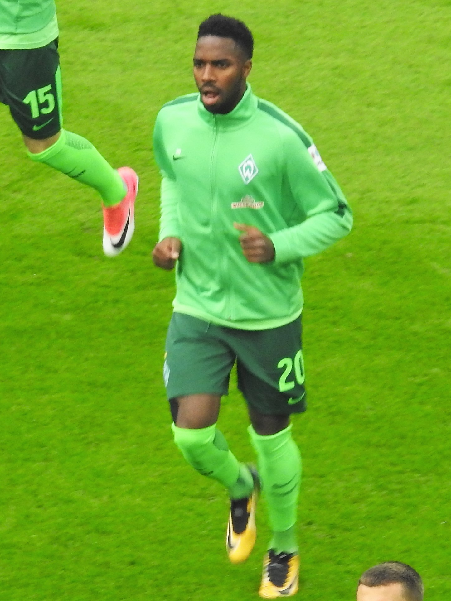 Garcia, Ulisses Werder